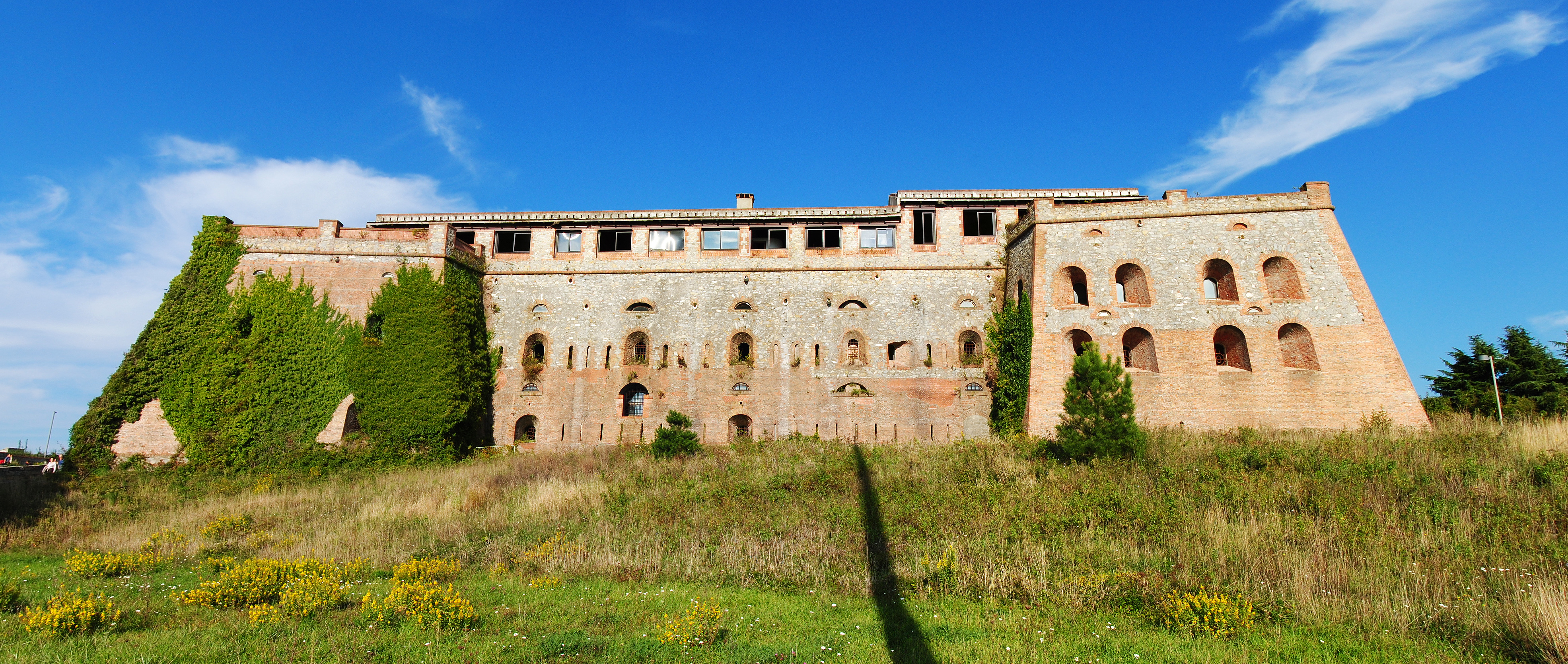 Facciata principale del Forte Begato - Genova - ottobre 2015